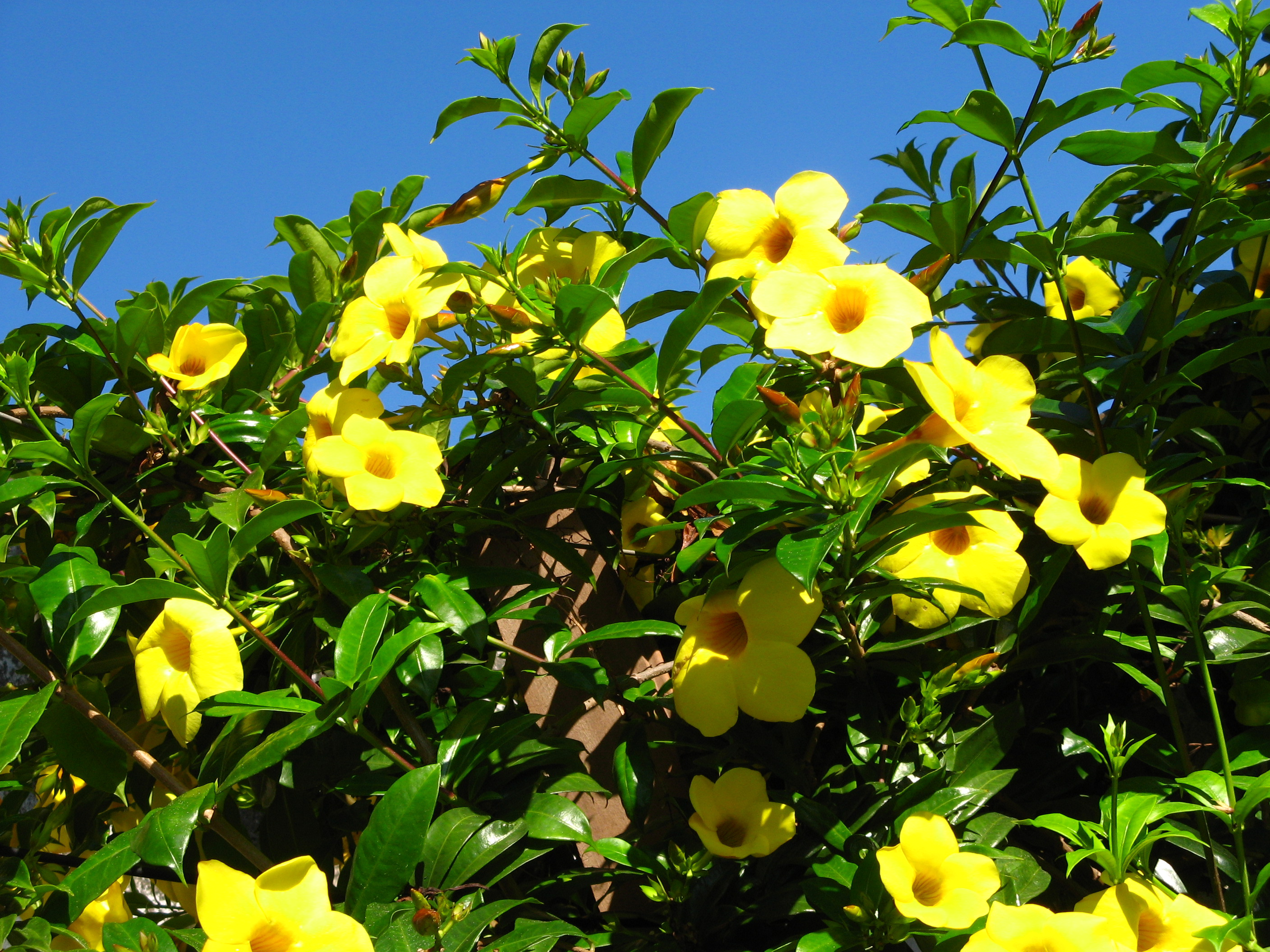 Alamanda amarela (Allamanda cathartica). Sao Paulo. BRAZILIAN NATIVE arbustive tree